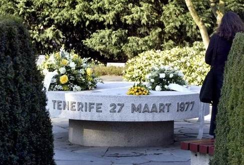 Westgaarde monument (Amsterdam)